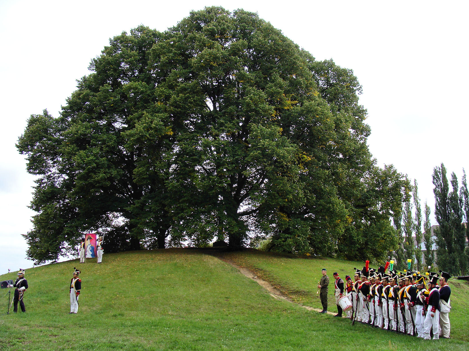 Wzgórze Napoleona w Szczecinie. Na pierwszym planie grupa rekonstrukcji historycznej w mundurach z okresu napoleońskiego.